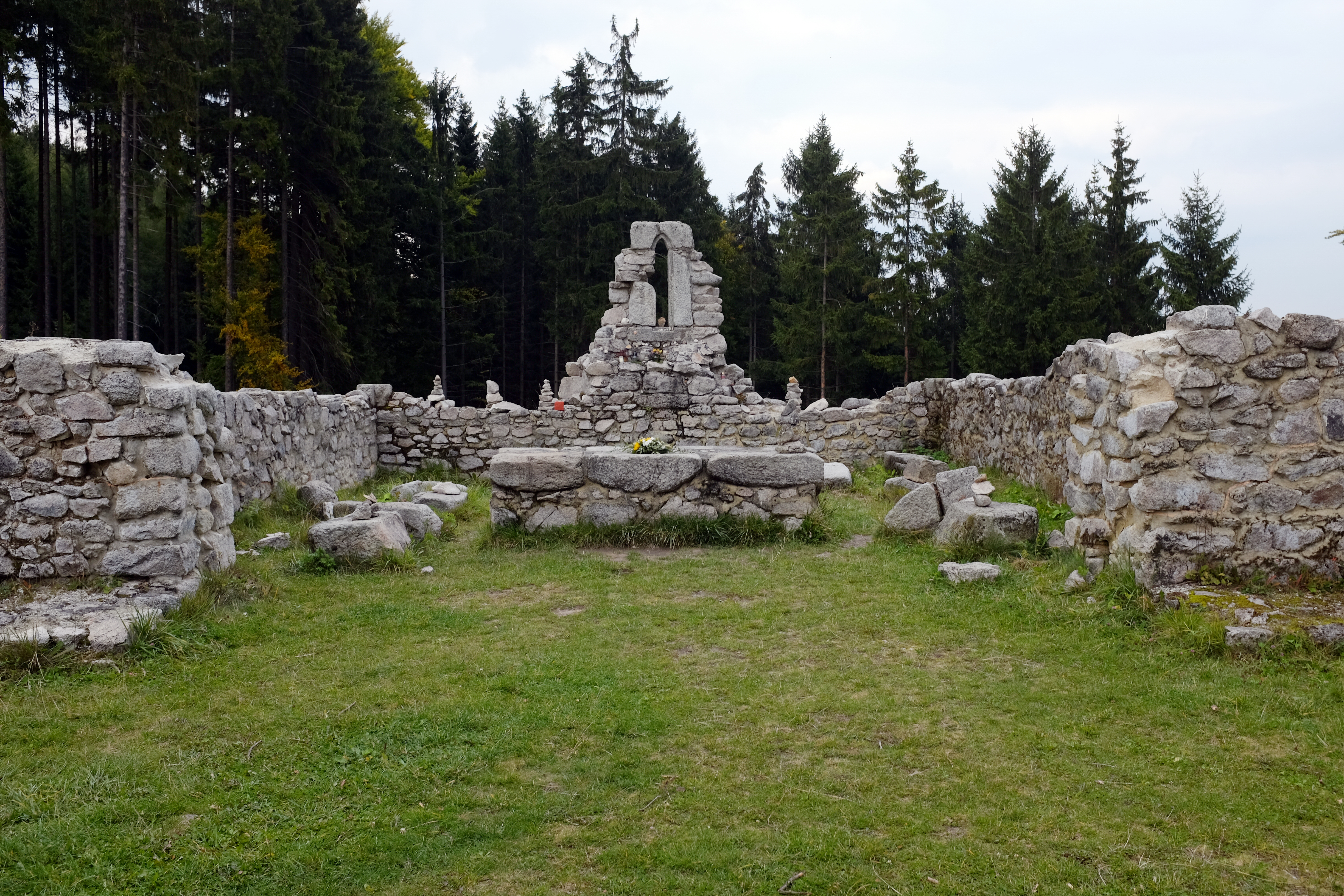 Ruiny kostela sv. Mikuláše pod Krudumem, Slavkovský les, okres Sokolov